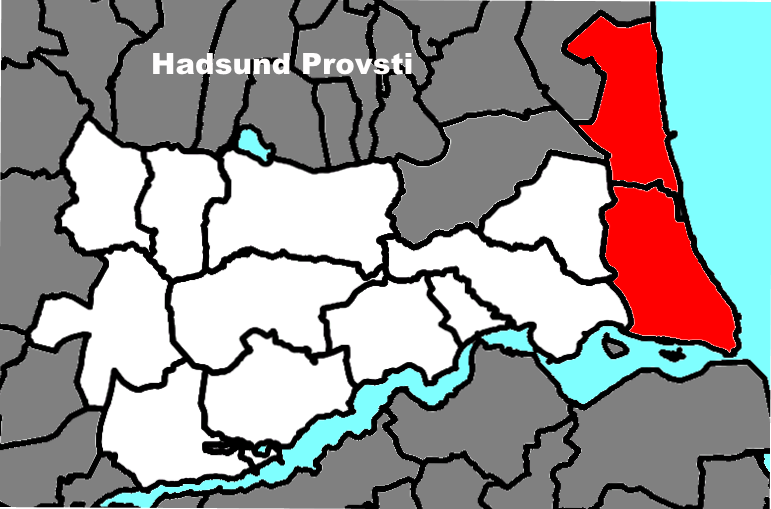 Pastorats beliggenhed i Hadsund Provsti.